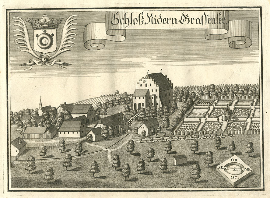 “Schloß Nidern Grassensee.” (Untergrasensee, Pfarrkirchen), aus: Beschreibung des Churfürsten- u. Hertzogthumbs Ober- und Nidern Bayrn, Rentamt Landshut. – Gericht Pfarrkirchen, 1723